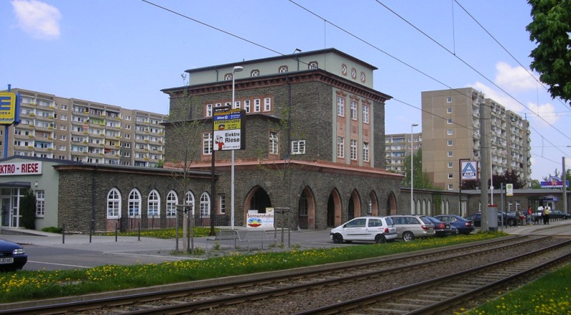 Empfangsgebäude des ehemaligen Flughafens in Chemnitz